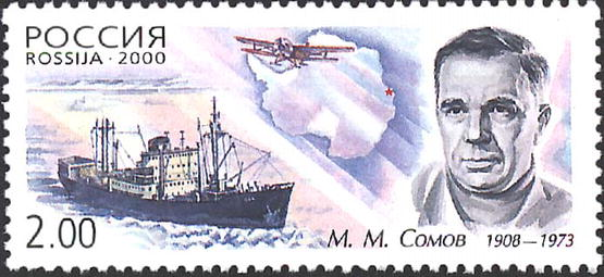 Timbre russe en l'honneur de M. M. Somov (1908-1973)